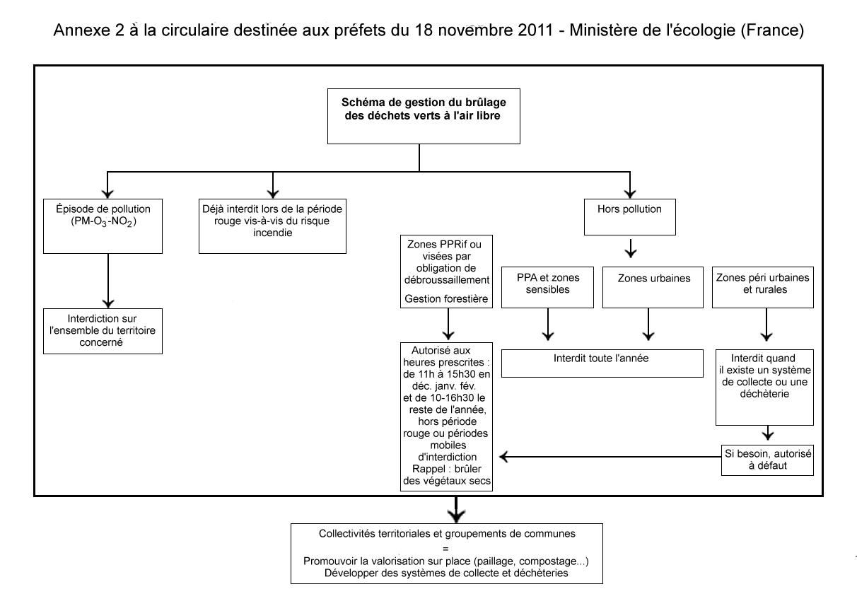 Schéma de gestion du brûlage de déchets verts à l'air libre en France, conforme au tableau présenté à la page 9 de la Circulaire du 18 nov. 2011 relative à l’interdiction du brûlage à l’air libre des déchets verts du Ministère de l'Écologie, du Développement durable et de l'Énergie (France).